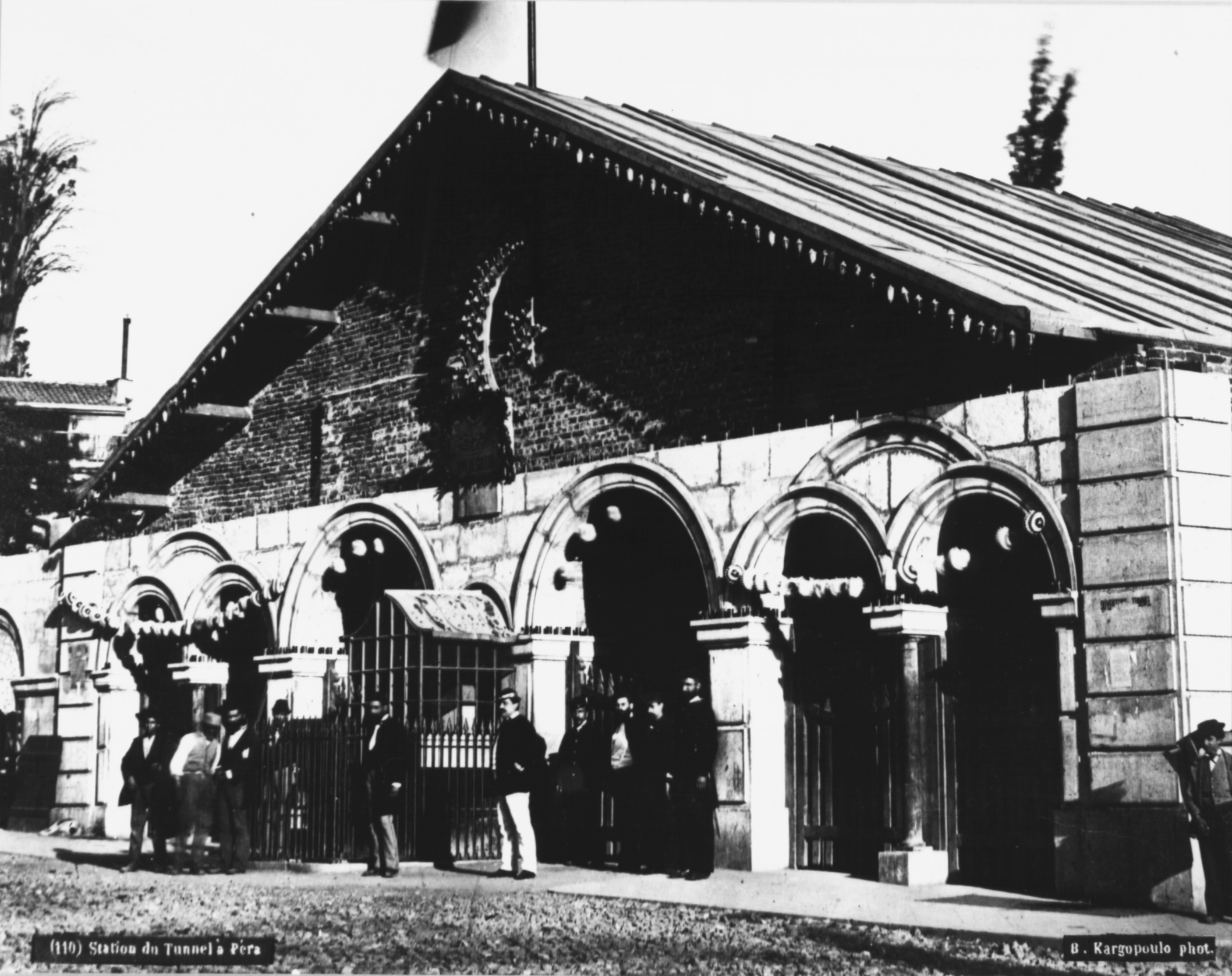 Tunnel station at Pera, Istanbul, 1884 Photo: B. Kargopoulo SALT Research, Photograph Archive Pera’da Tünel istasyonu, İstanbul, 1884 Fotoğraf: B. Kargopoulo SALT Araştırma, Fotoğraf Arşivi